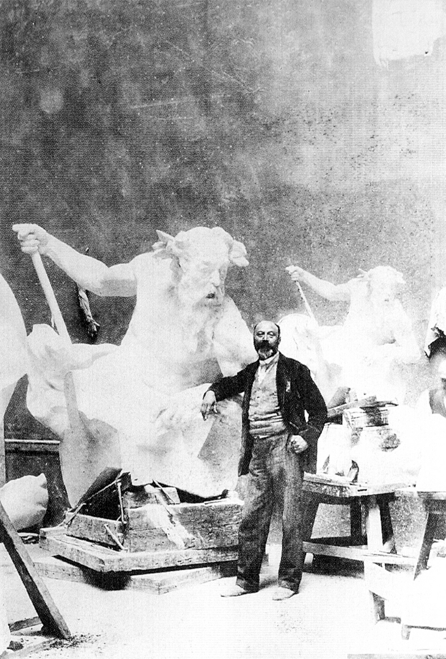 Bildhauer Rudolf (von) Weyr vor seinen Skulpturen